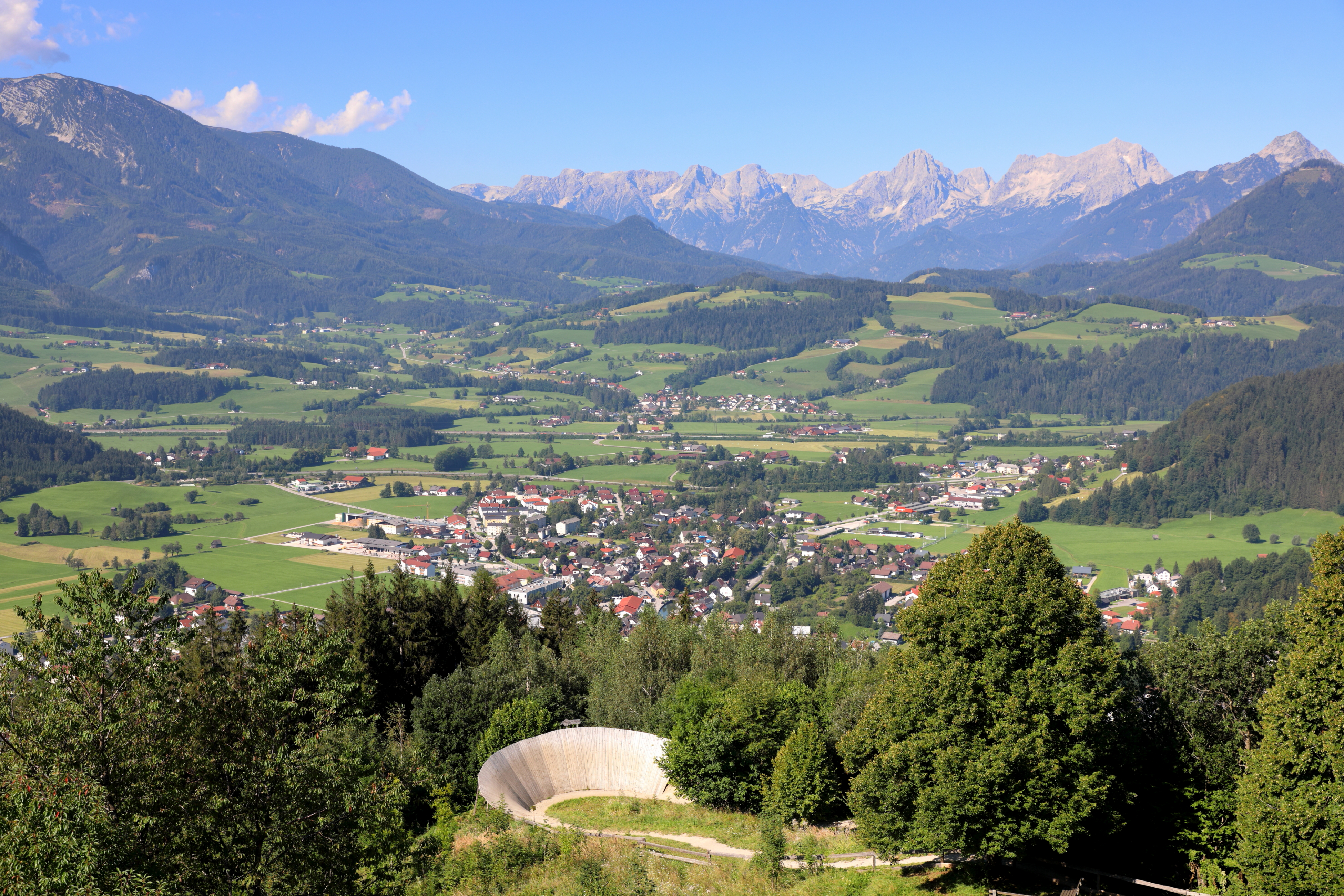 Blick vom Panoramaturm auf dem 858 m hohen Wurbauerkogel auf die oberösterreichische Marktgemeinde Windischgarsten bzw. Blick in Richtung Westsüdwest. Im Hintergrund das Tote Gebirge und am unteren Bildrand eine Steilkurve des Bikeparkes.